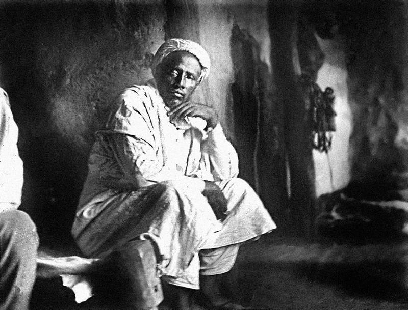 Аба Муда. Фотографии Н. Л. Сверчкова, 1913 год. Музей антропологии и этнографии им. Петра Великого